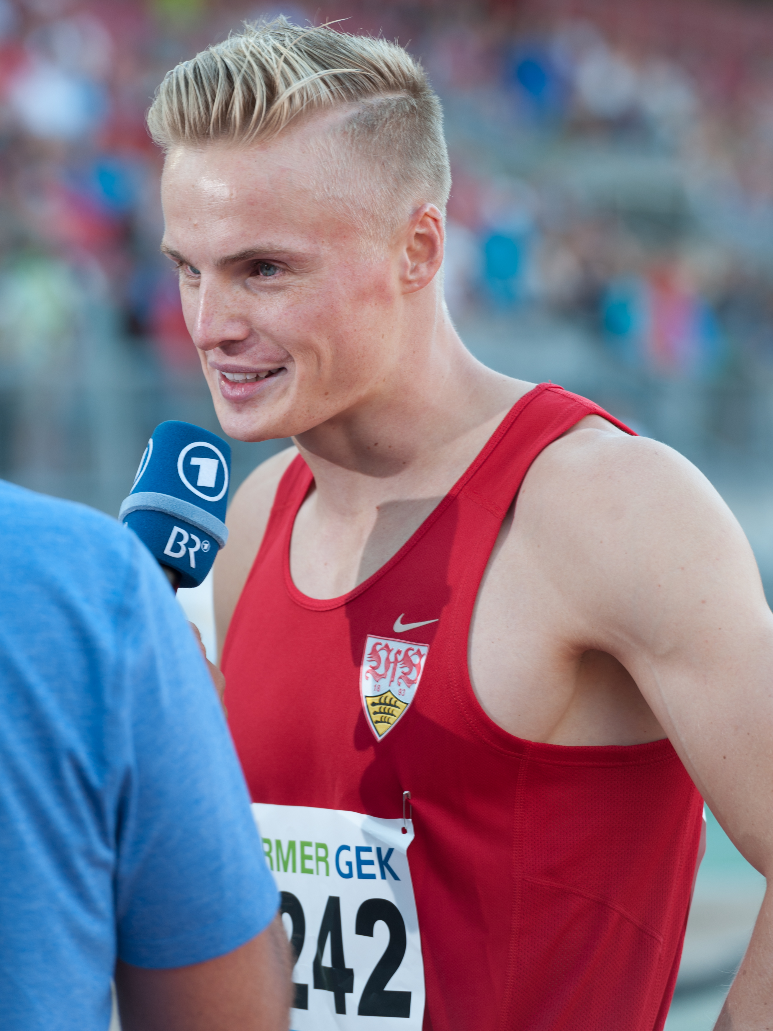 Deutsche Leichtathletik-Meisterschaften 2015: Männer 110m Hürden - Gregor Traber, VFB Stuttgart 1893